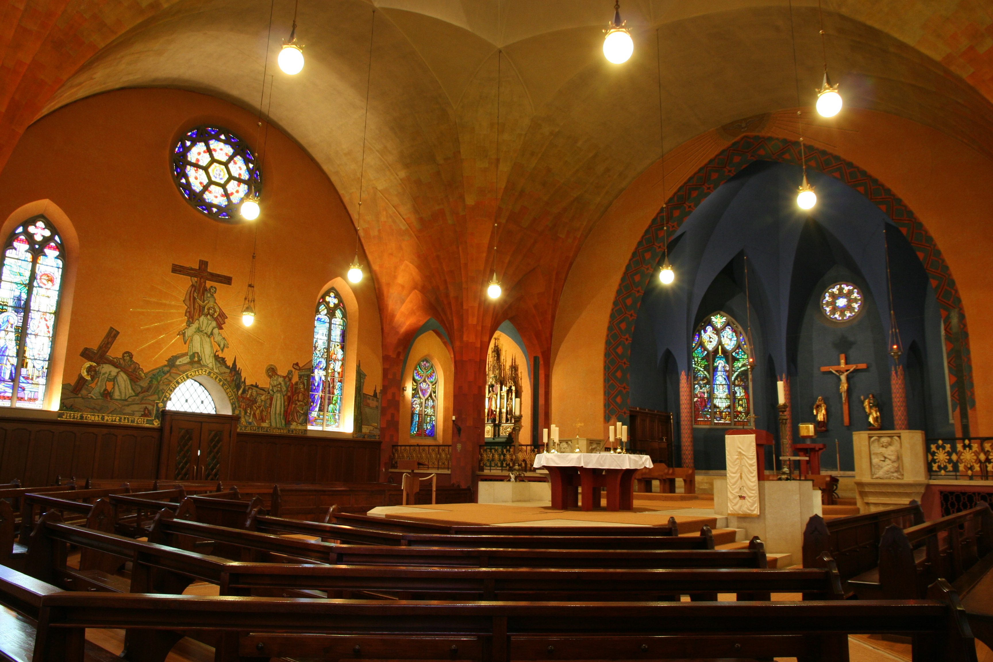 Römisch-katholische Pfarrkirche St. Maria Biel/Bienne, Altarraum in der Oberkirche